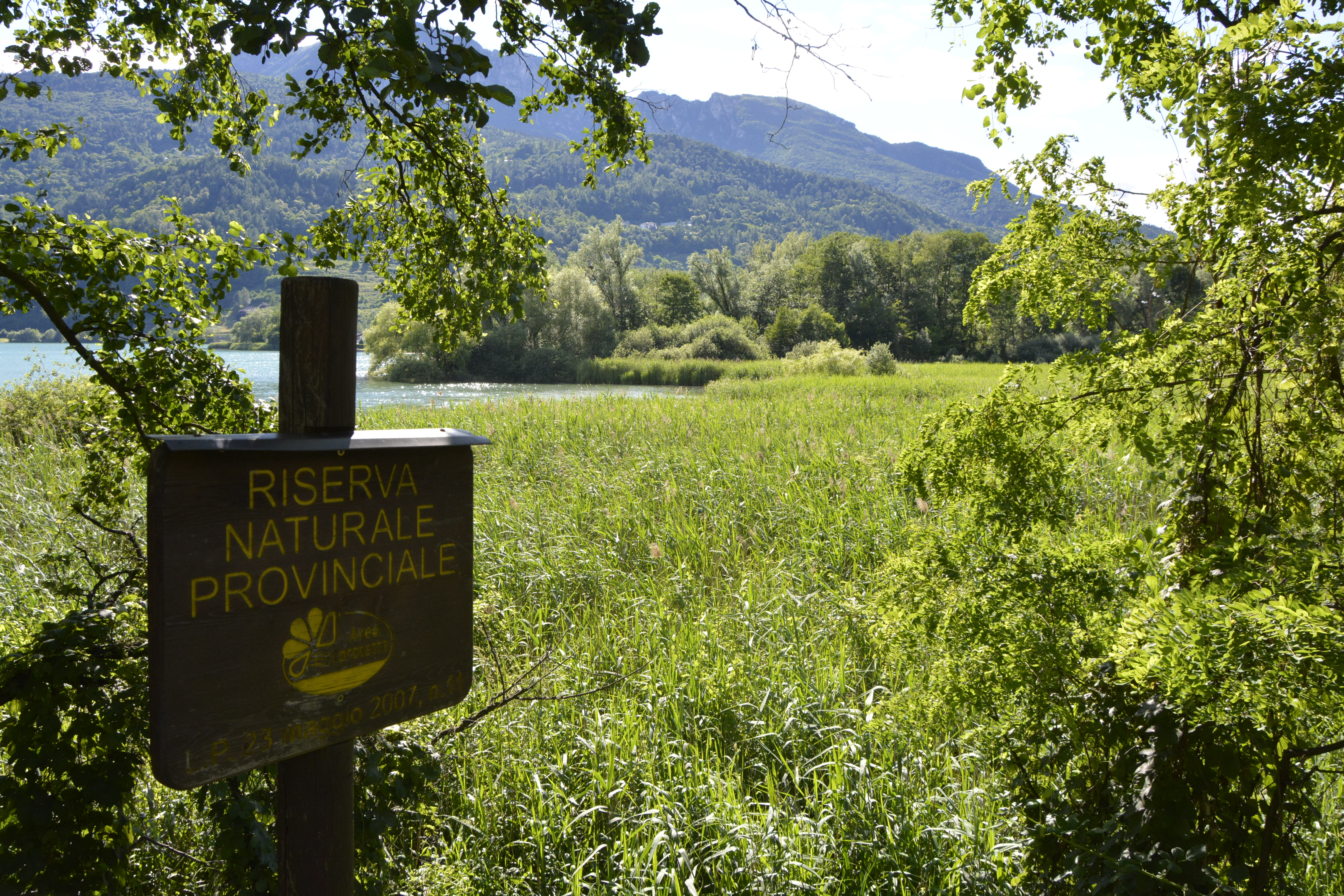 Biotopo Canneti di San Cristoforo (Q3640203)